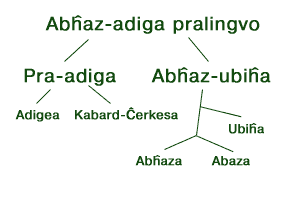 Skemo de la lingvaro. Desegnis persone mi laŭ akademiaj fontoj, rus- kaj angla-lingvaj.